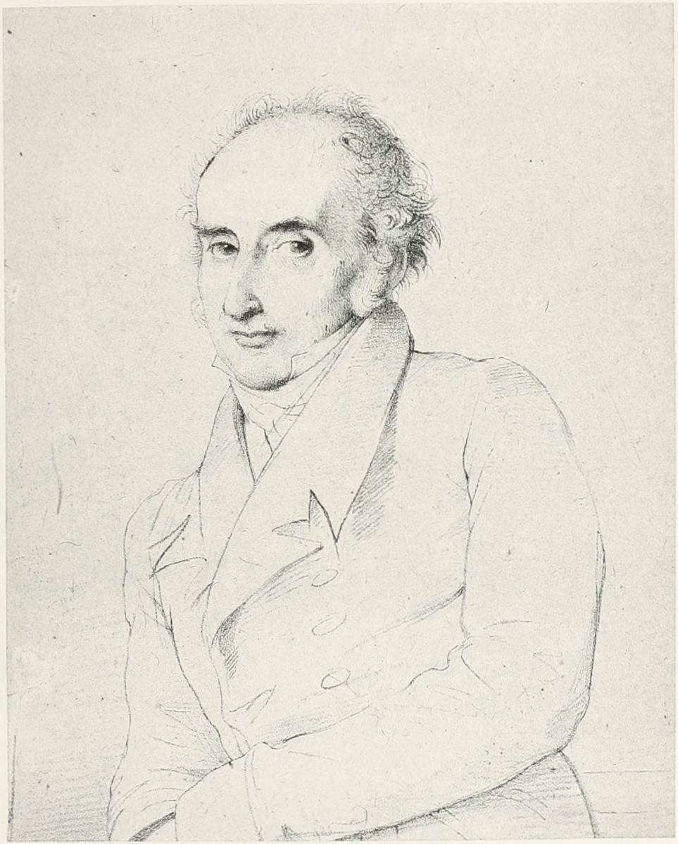 J.-B. Lepère